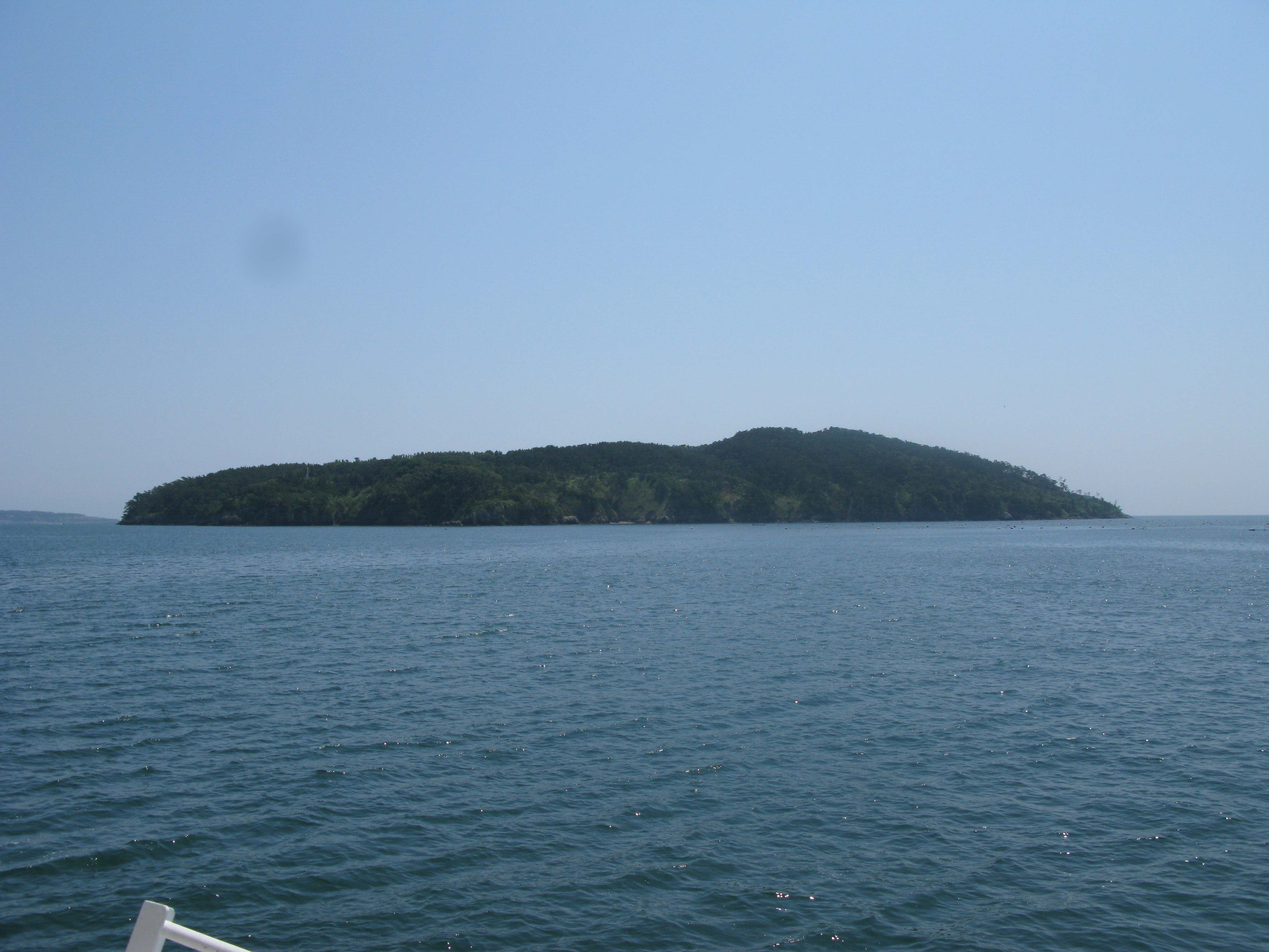 田代島 西側からの撮影